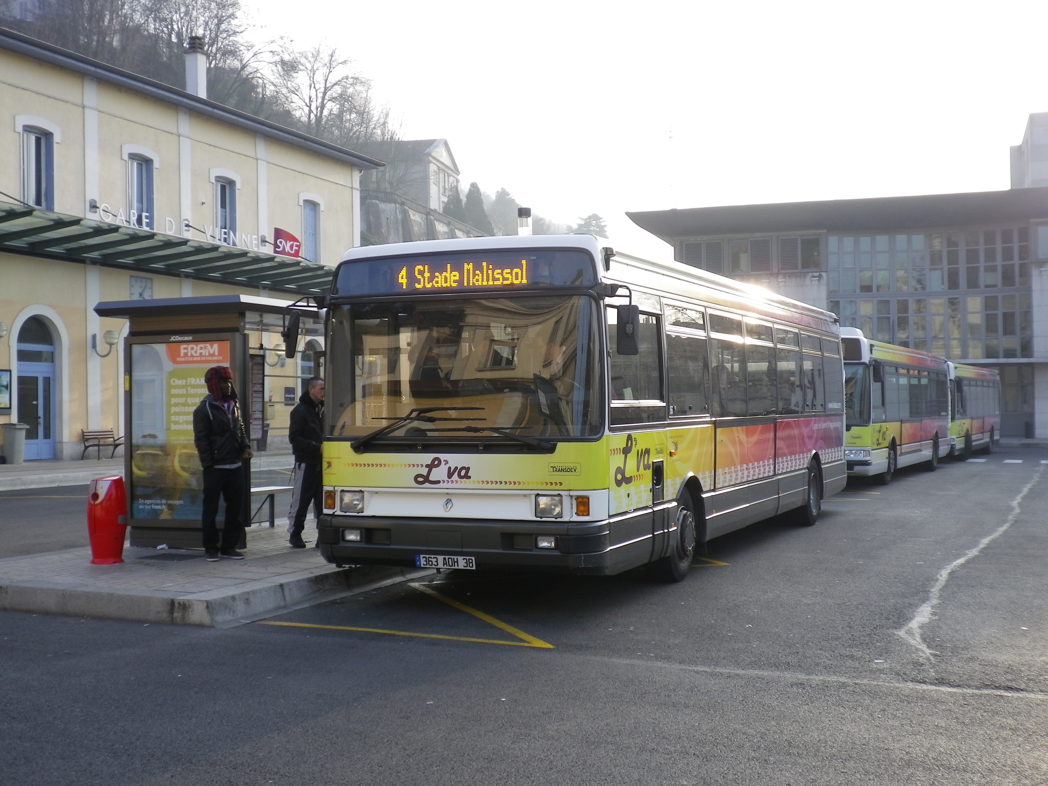 Renault R312 - Réseau L'VA - ViennePentax Optio H90